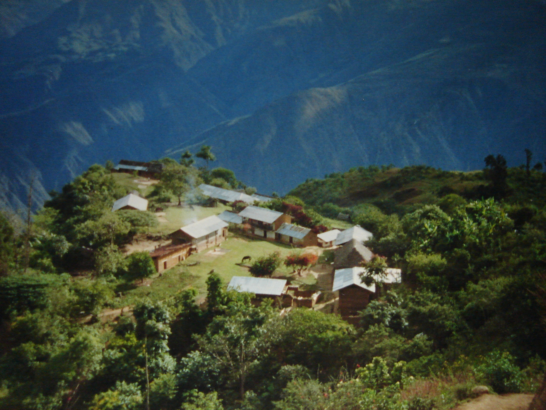 Como si el Paraíso estuviese en la tierra, al recorrer los caminos de Providencia, al recorrer sus caminos vemos hermosas vistas como la del Anexo de Hondul; una pequeña meseta en una montaña, ya cerca al Marañón.